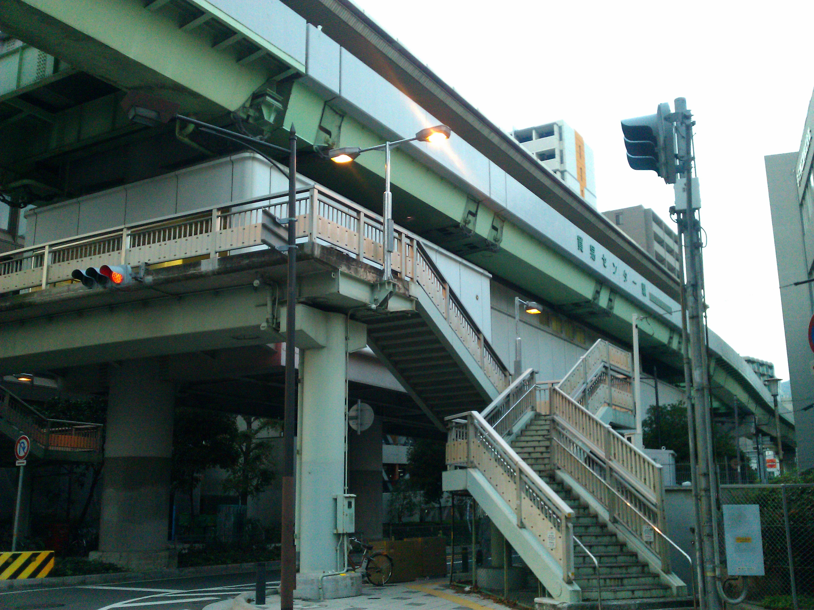 神戸新交通貿易センター駅